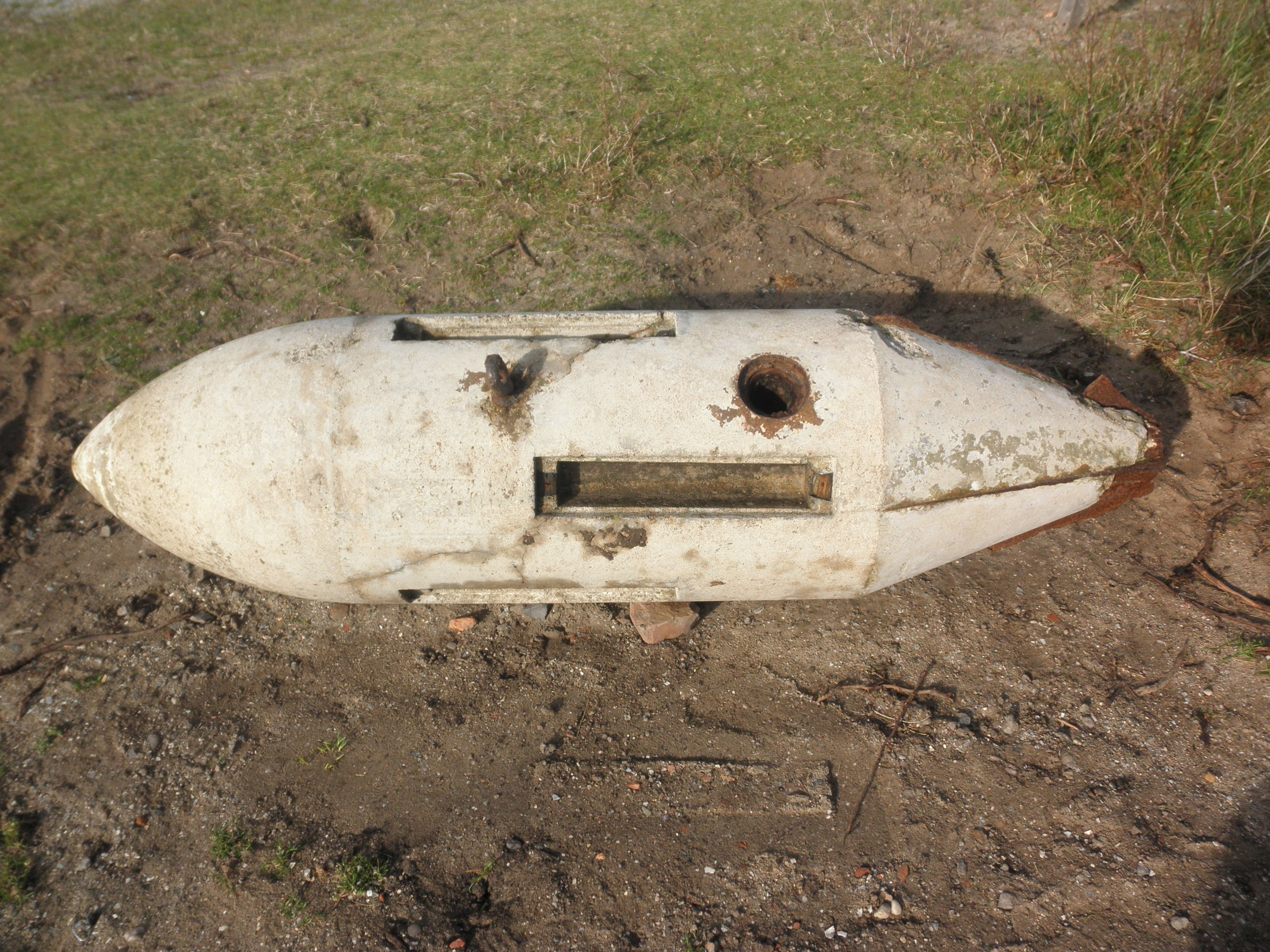 Duitse oefenbetonbom van 250 kg. Werd gebruik als oefenprojectiel voor duikbommenwerpers. De metalen staartvinnen zijn weggeroest. Bij contact op de grond zorgde chemicaliën voor een gekeurde rookwolk zodat de piloot kon zien of het het doel geraakt had. Foto genomen op Groot Olmen in de duinen ten zuiden van IJmuiden.